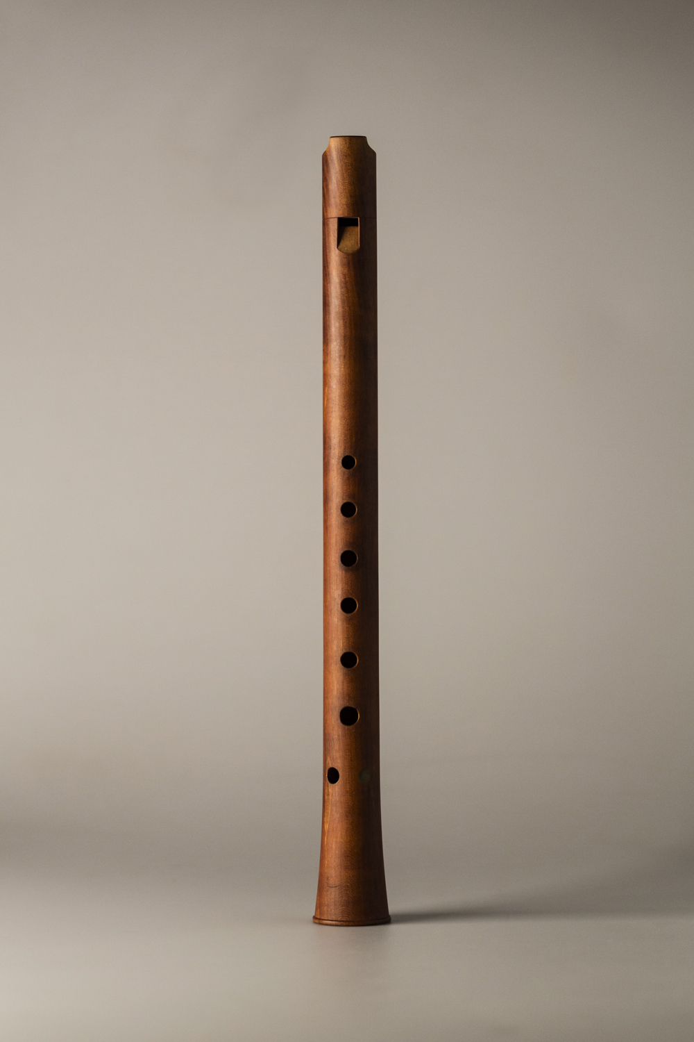 Ganassi-type-alto-recorder-by-Bob-Marvin-photo-by-Oscar-Romero (oscaromi).